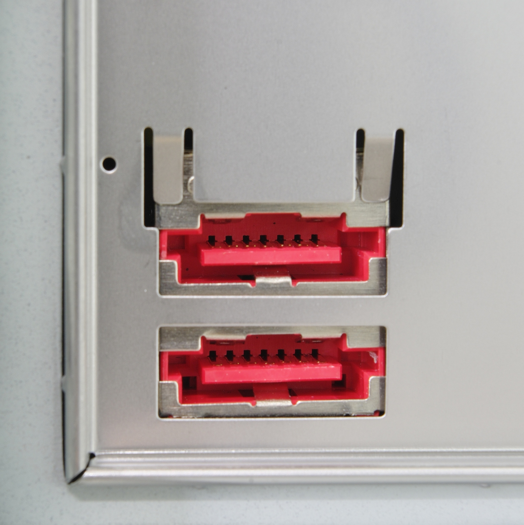 Steckverbindung eSATA